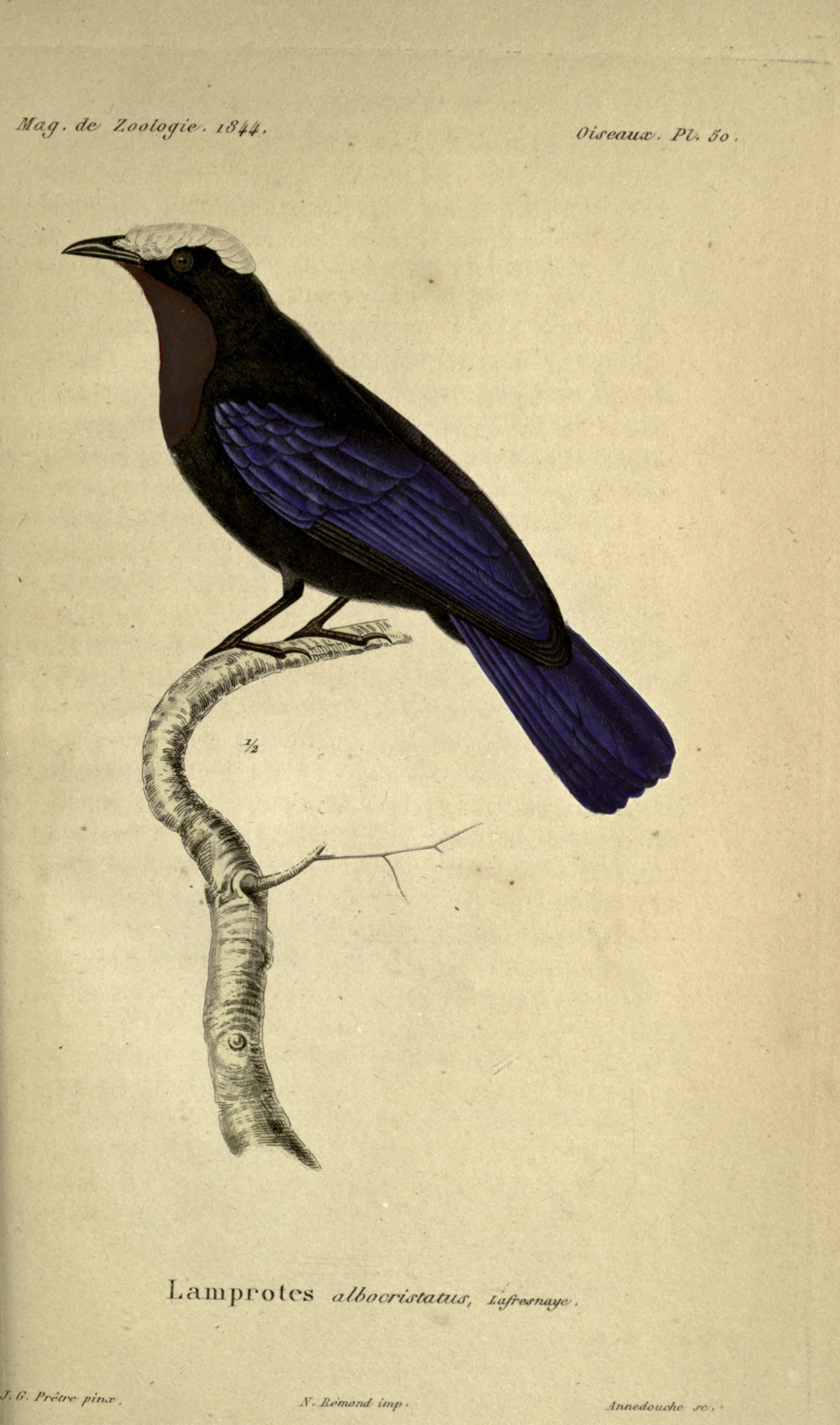 Magasin de zoologie.